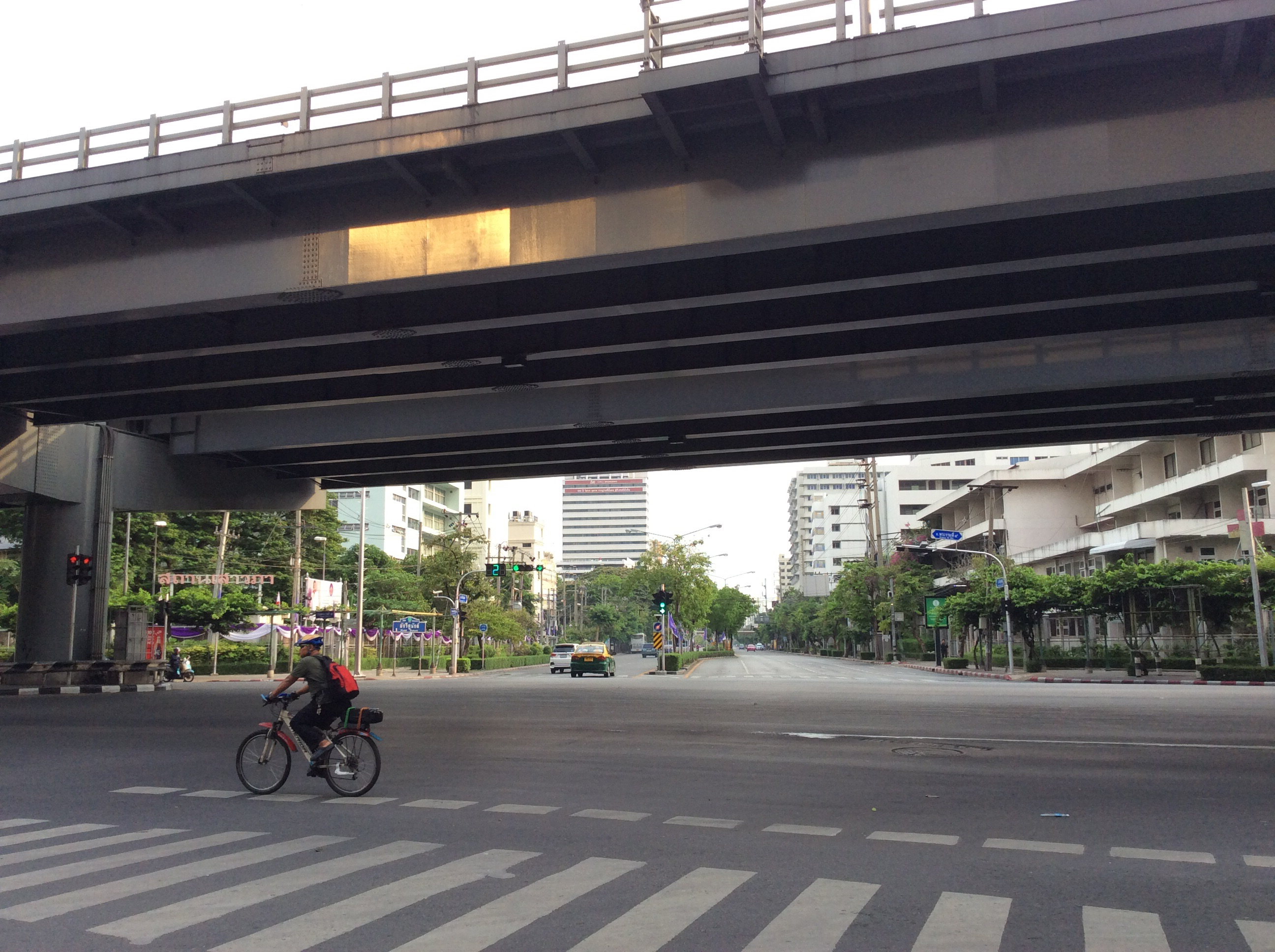 Suriya Wong, Bang Rak, Bangkok, Thái Lan